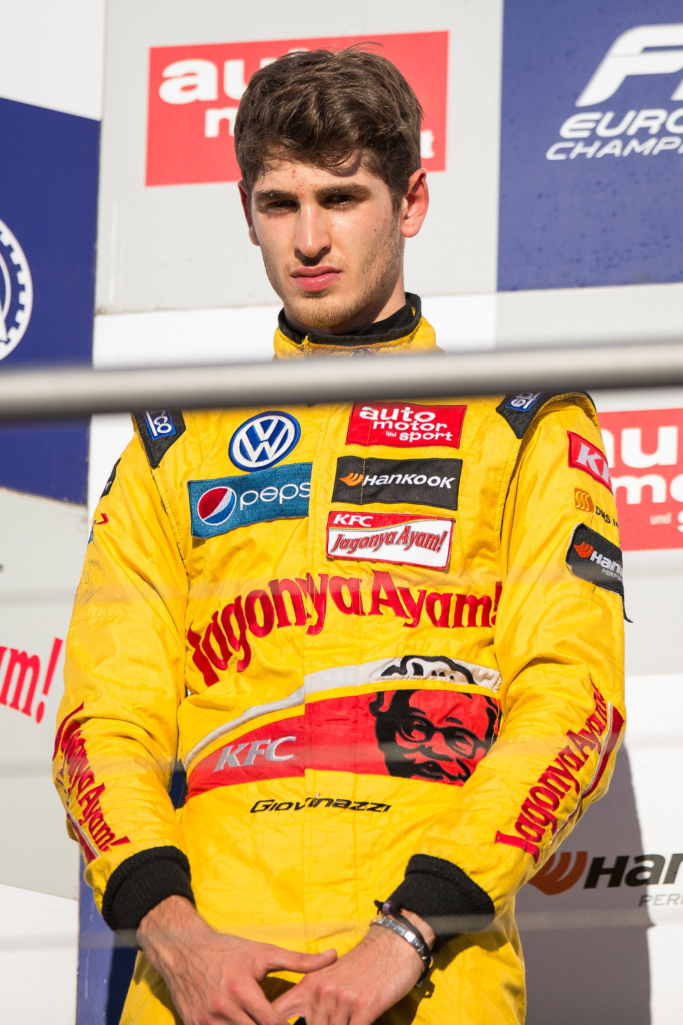 Antonio Giovinazzi,DTM,Deutsche Tourenwagen Masters,F3 FIA European Championship,FIA Formel 3 Europameisterschaft,Hockenheimring,Jagonya Ayam with Carlin,Motorsport,Siegerehrung